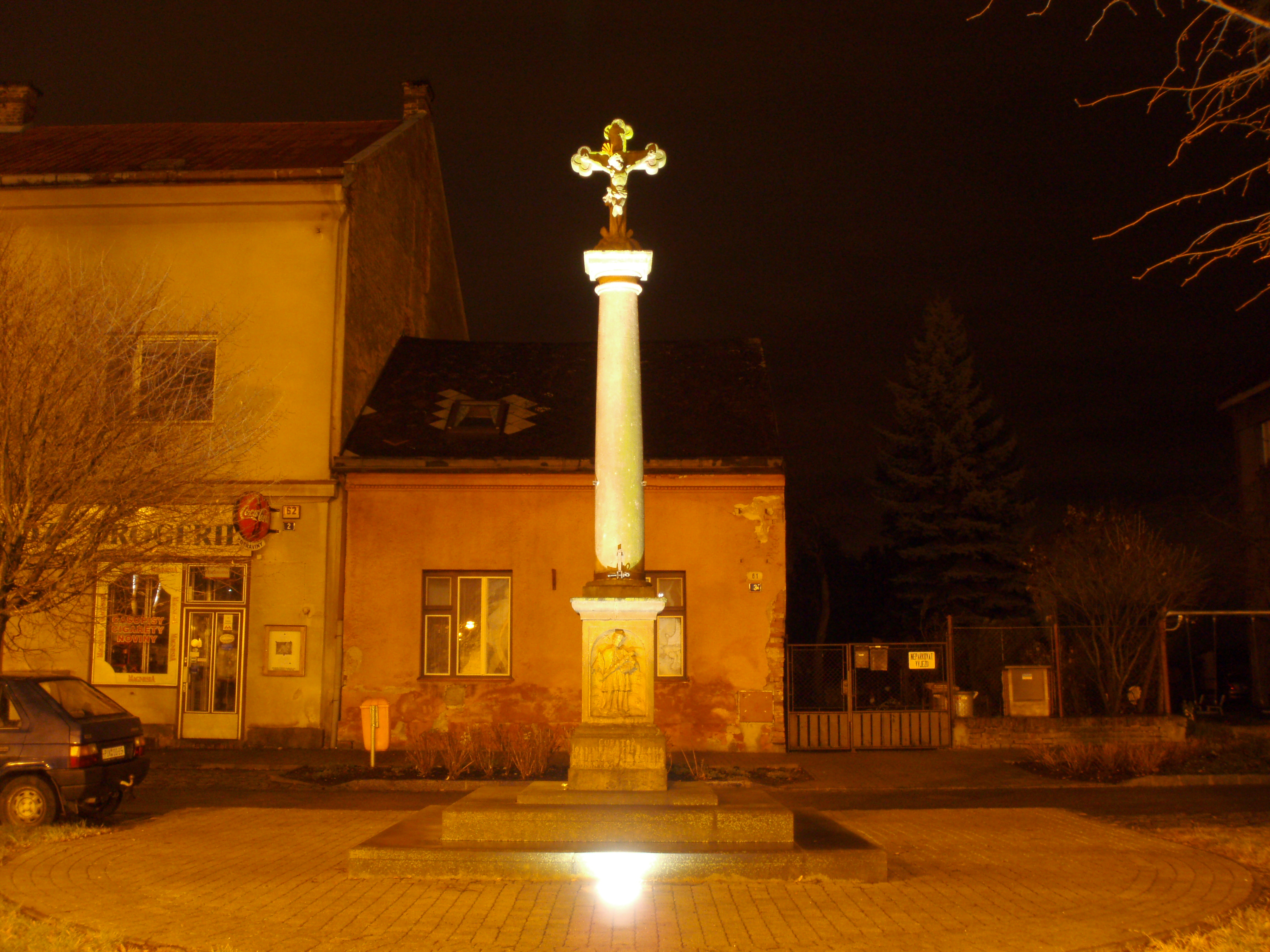 Kříž na Denisově náměstí